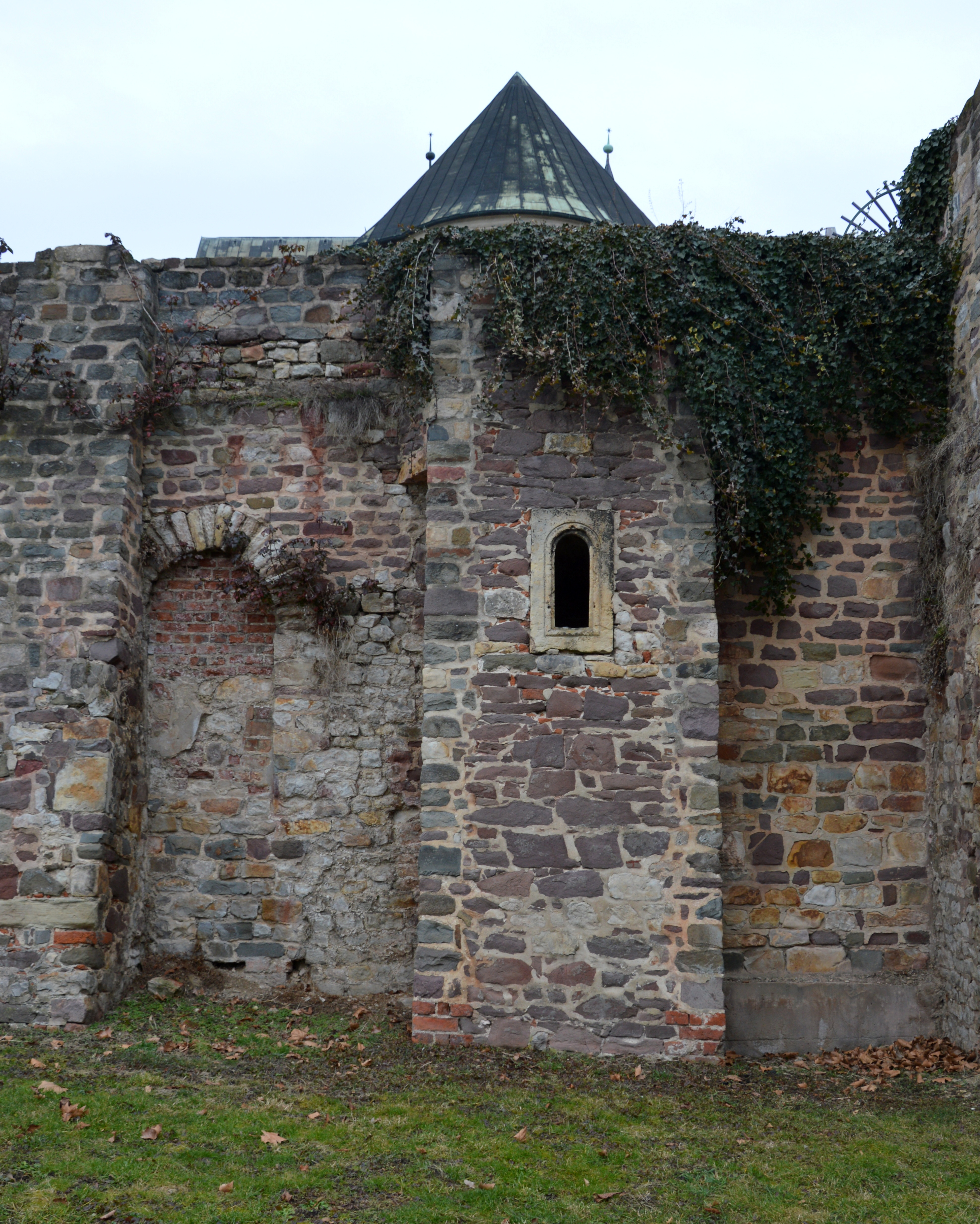 Stadtmauer Magdeburg am KULF